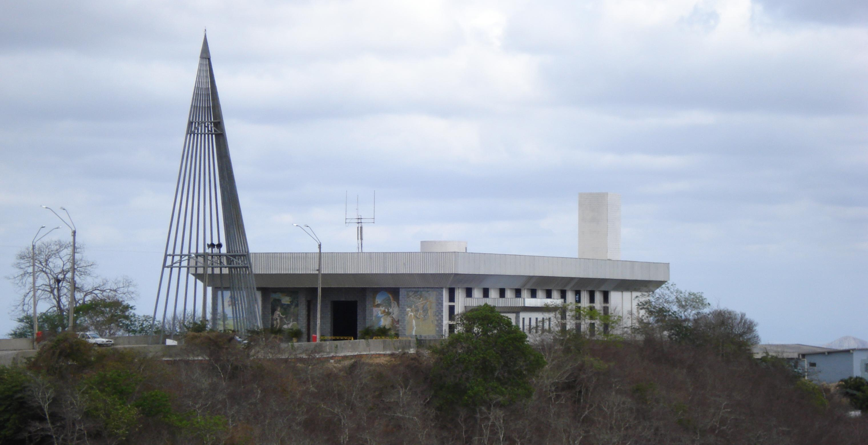 Santuario de Nossa Senhora Imaculada Rainha do Sertão. Quixadá, Ceará, Brasil